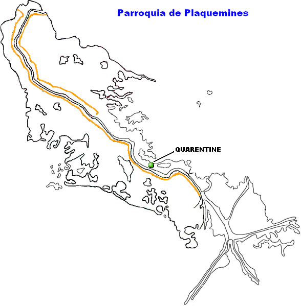 Quarentine, Louisiana.